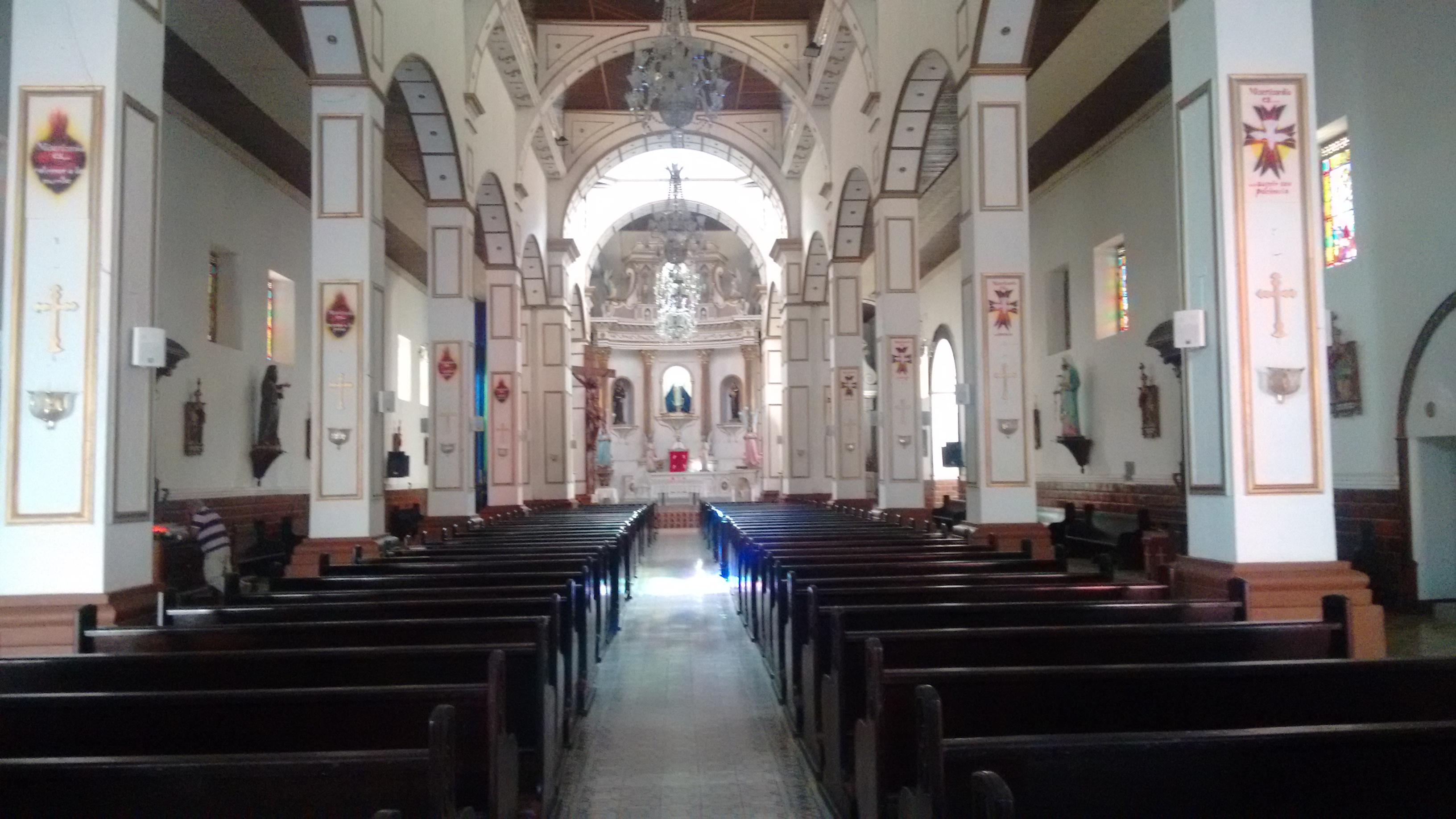 Nave central Iglesia de la Inmaculada Concepción (Carolina del Príncipe)